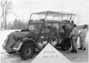 Horch